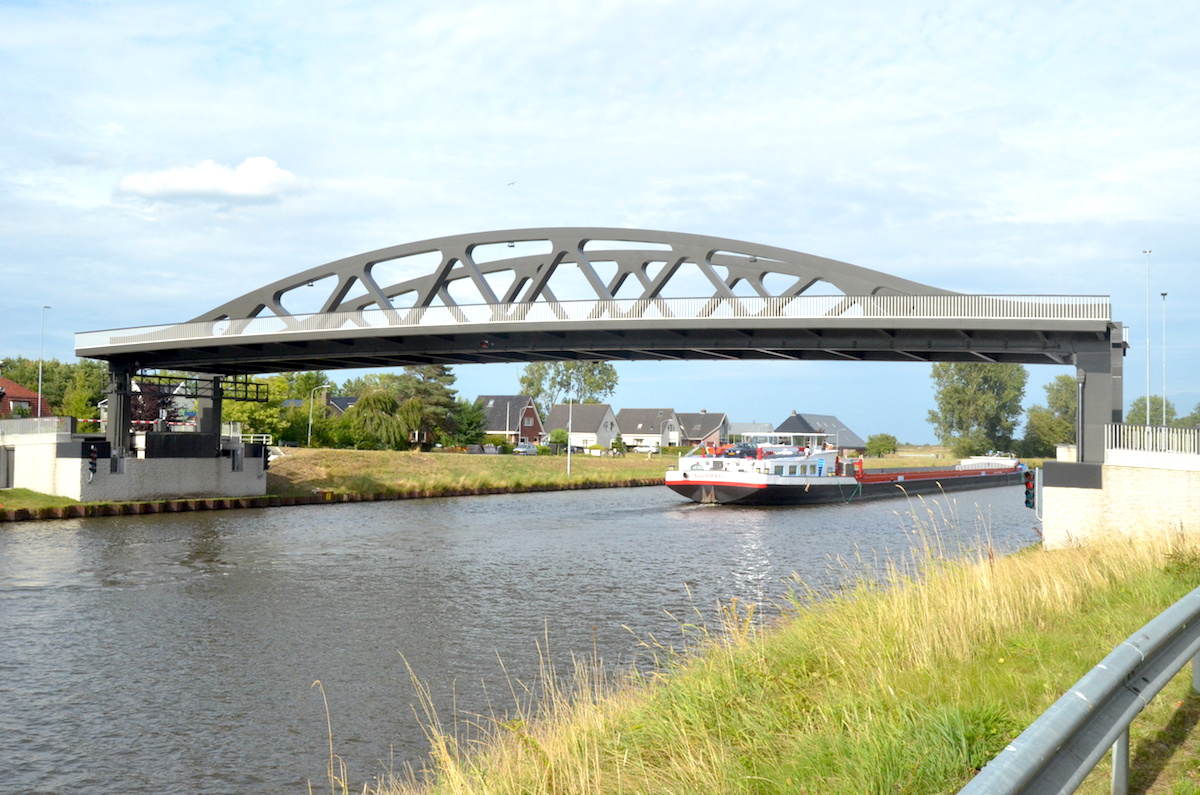 De hefbrug over het Van Starkenborghkanaal tussen Noordhorn en Zuidhorn. Foto: Erik Swierstra.